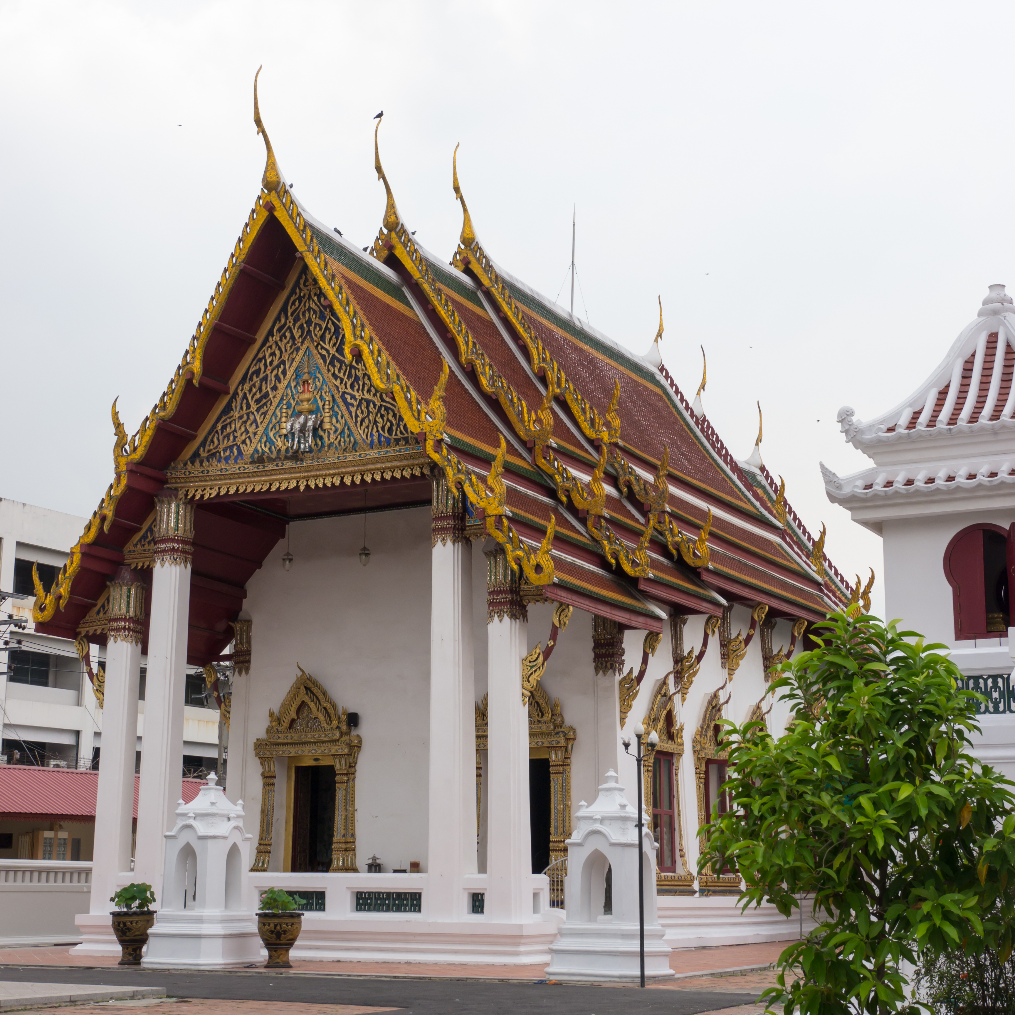 วัดโมลีโลกยาราม